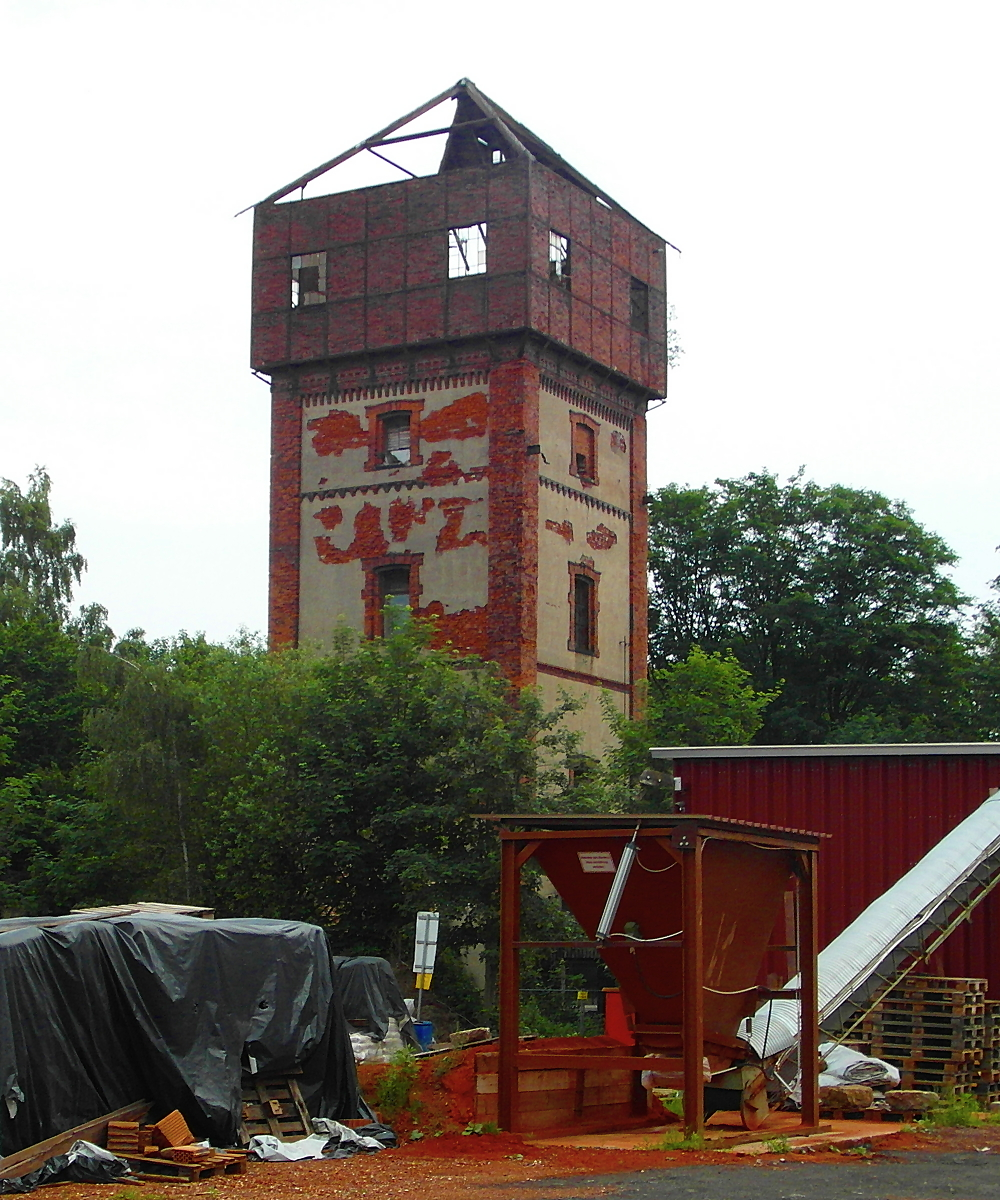 Der Wasserturm ist einer der ältesten erhaltenen Bauten des Georgschacht Stadthagen